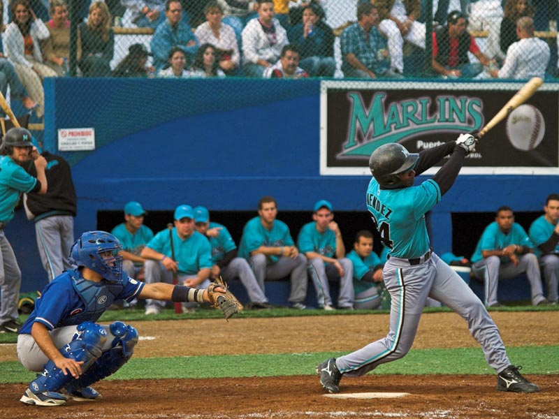 Pedro Mendez al bate en un Marlins - Sant Boi